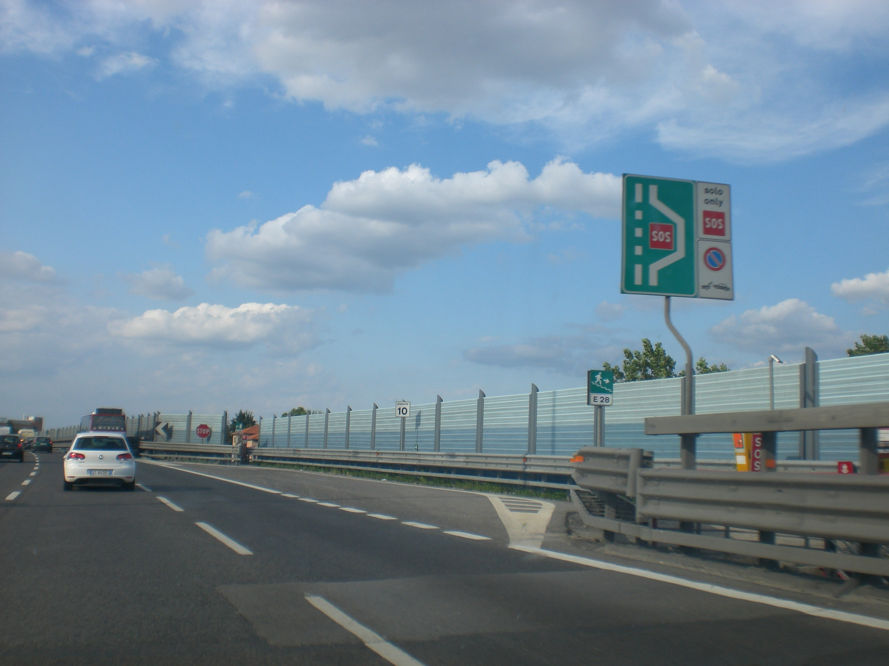 piazzola d'emergenza nell'A57